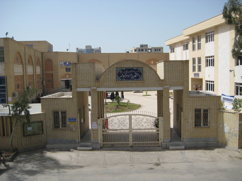 سردر دانشگاه پيام نور مركز بوشهر